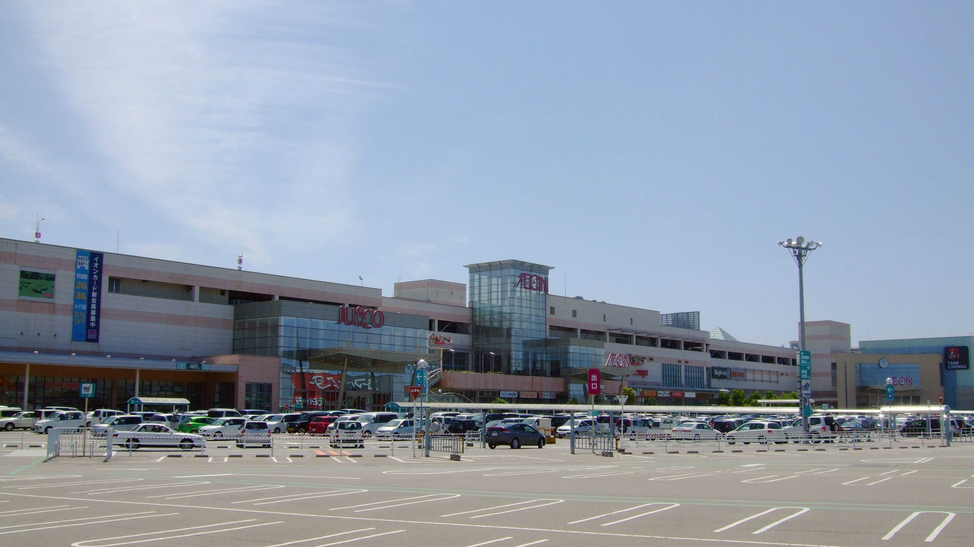 AEON MALL Takaoka イオンモール高岡（北東より撮影）